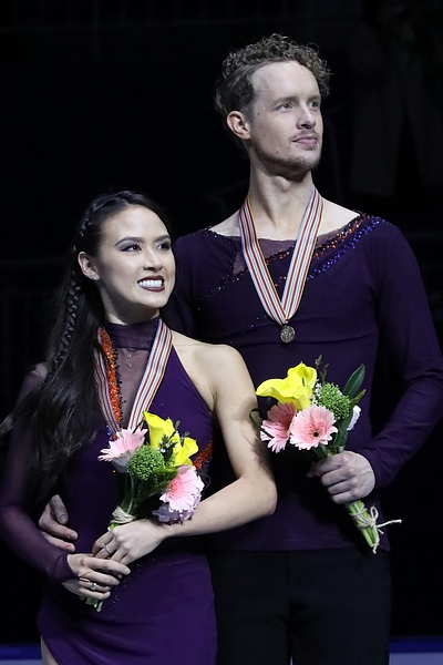 Мэдисон Чок и Эван Бейтс на чемпионате четырёх континентов 2017.